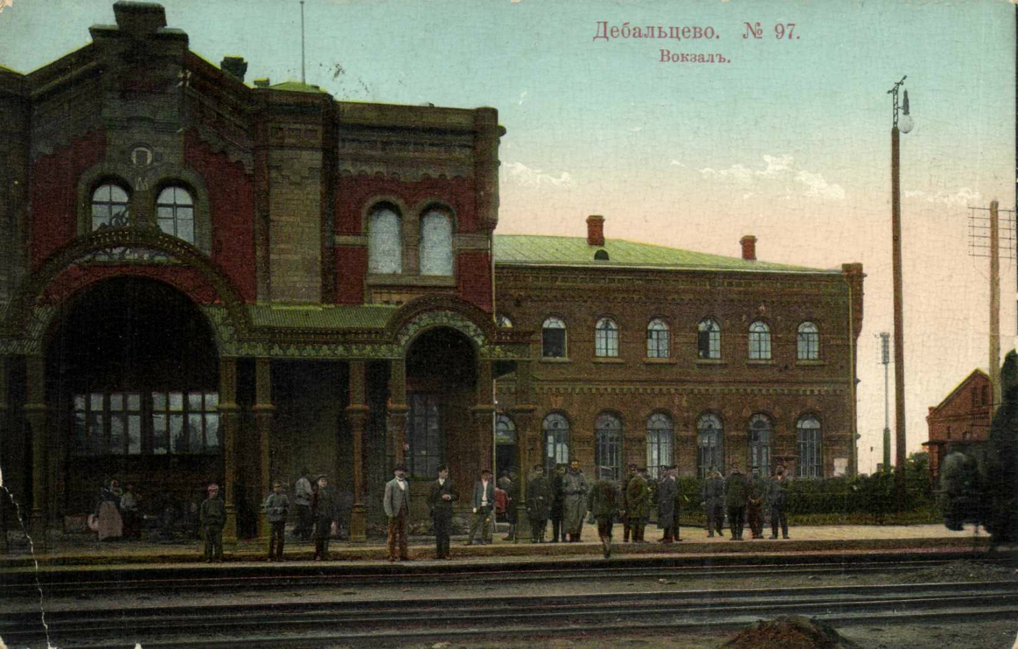 Дореволюционная открытка. Вокзал Дебальцево.